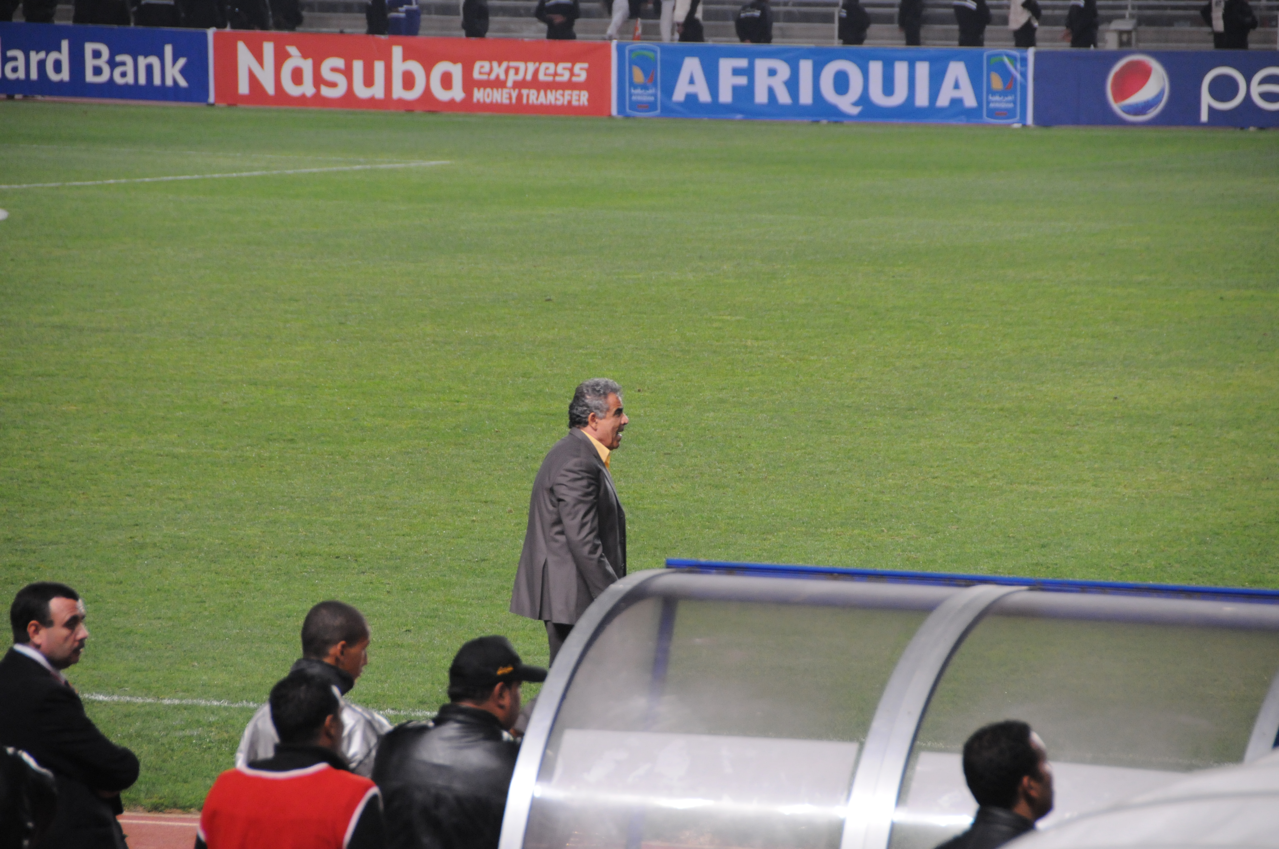 Match de la ligue d'Afrique de Football entre le CA tunisien et le MAS marocain de Fès.